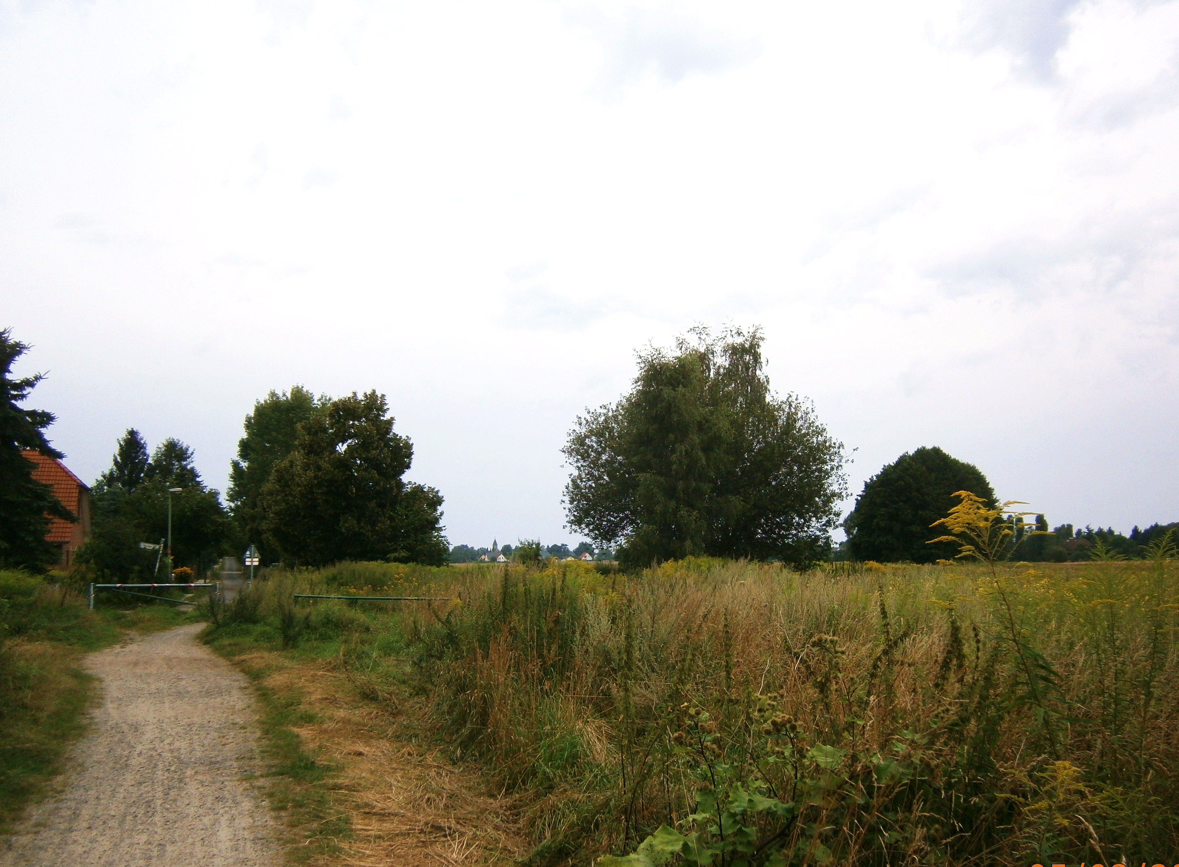 Brachfläche an der Nordseite der Straße 70, als Baulandreserve eingeplant.:Straße im Ortsteil Berlin-Karow